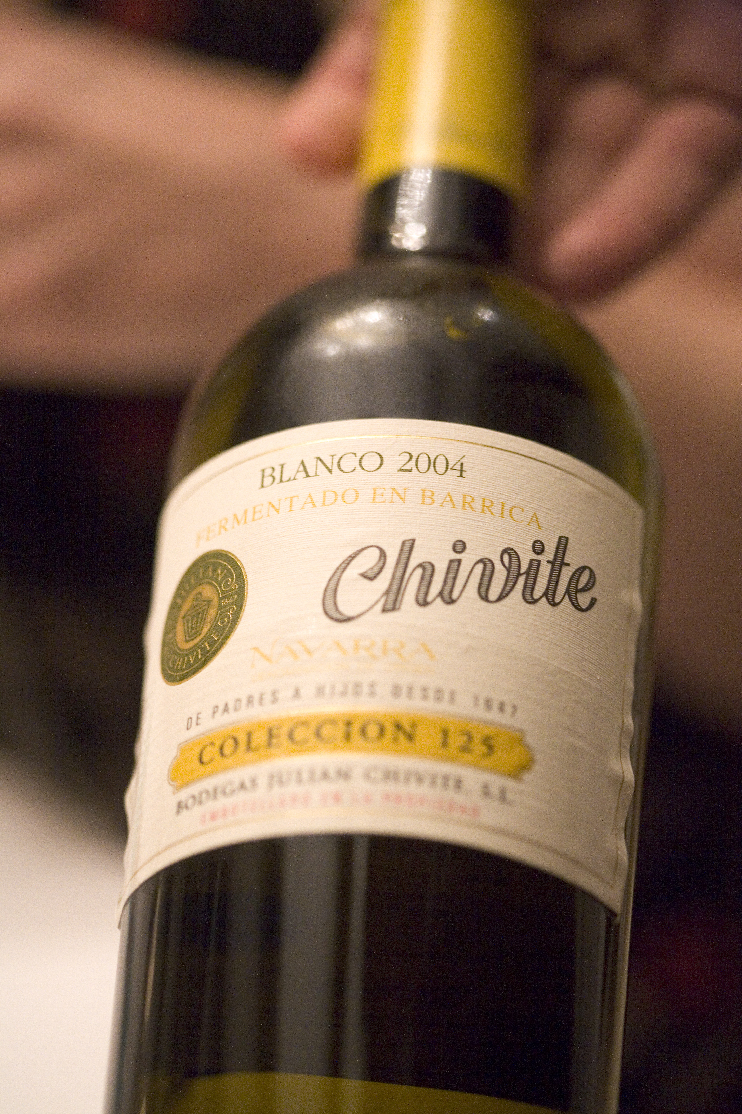 Chivite Collección 125 Anniversario 2004 Julián Chivite @ Navarra